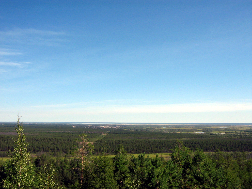 Долина Энсиэли, Намский улус, Якутия